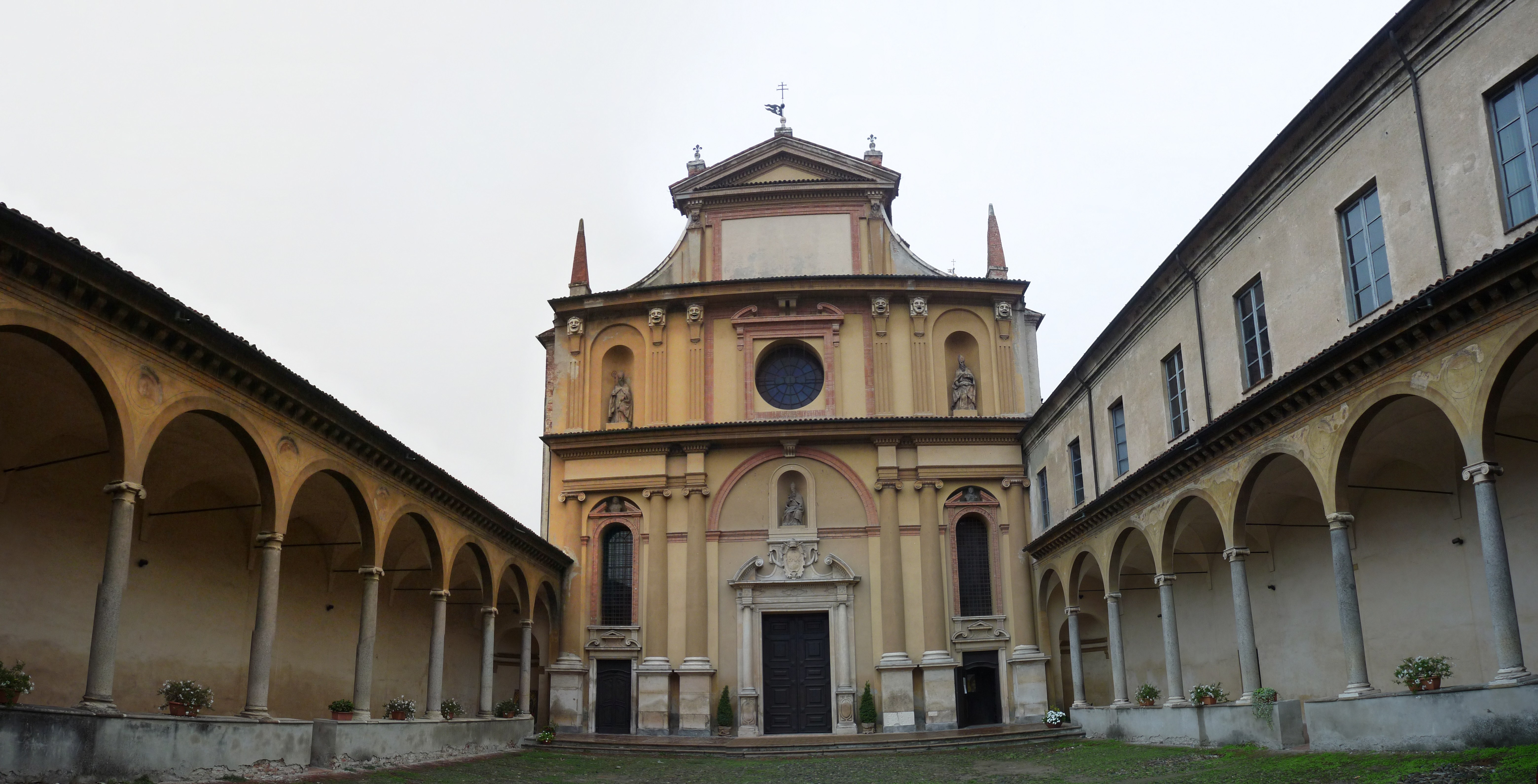 Fassadenansicht von San Sisto in Piacenza